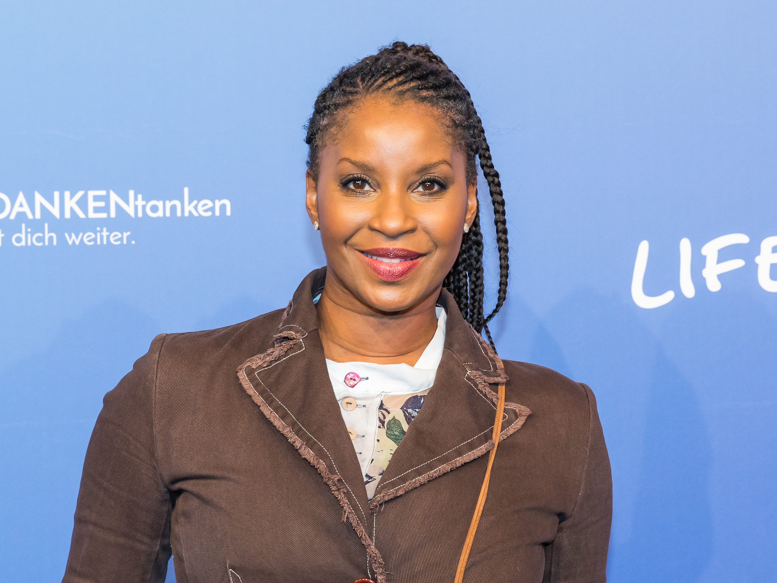 GedankenTanken Köln 2018 - 02 - Roter Teppich, der in blauer Farbe ausgeführt ist.Foto: Liz Baffoe, Schauspielerin